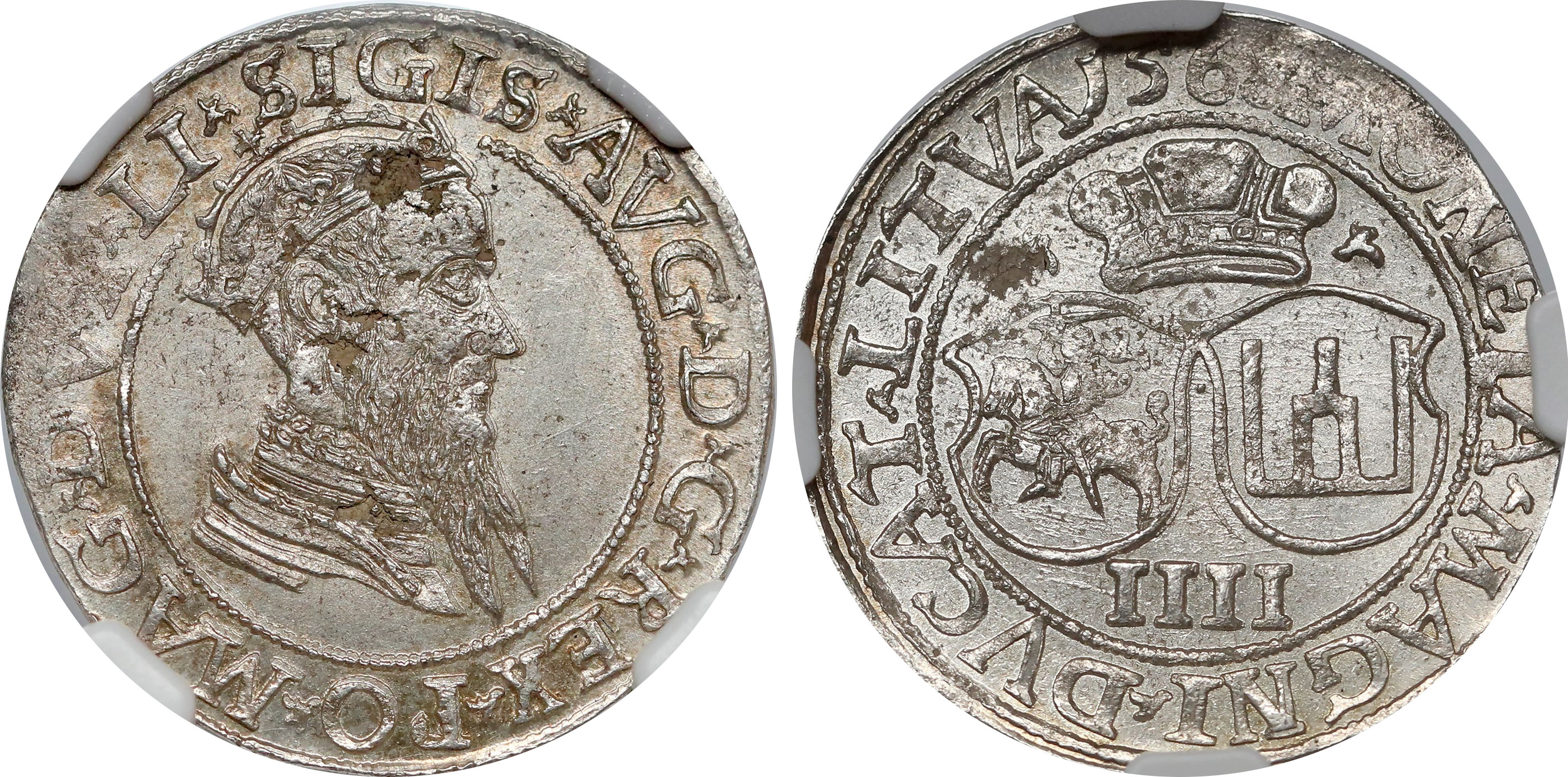 Czworak 1568 Wilno